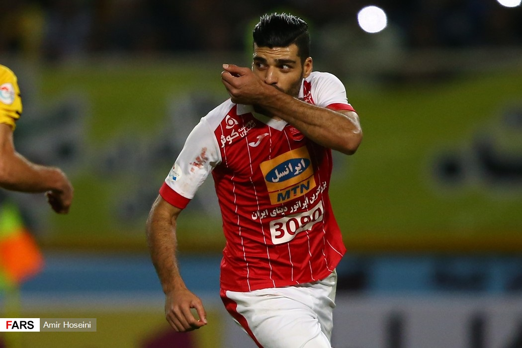 سپاهان ۲ - پرسپولیس ۲. دیدار سپاهان اصفهان و پرسپولیس تهران در هفته هفتم لیگ برتر فوتبال